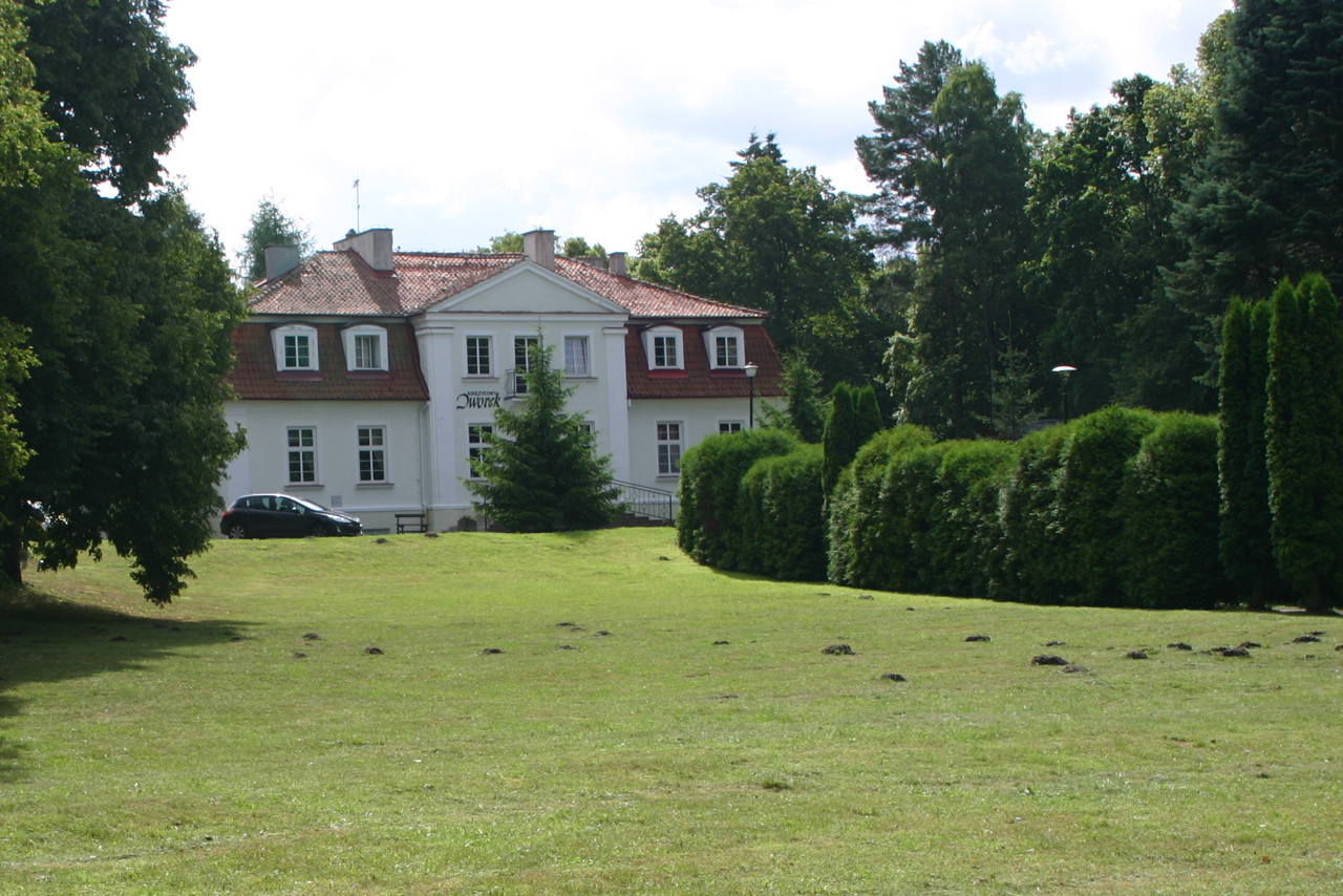 Gierłoż – (niem. Görlitz) - zespół pałacowo-ogrodowy (zabytek nr A-1526)